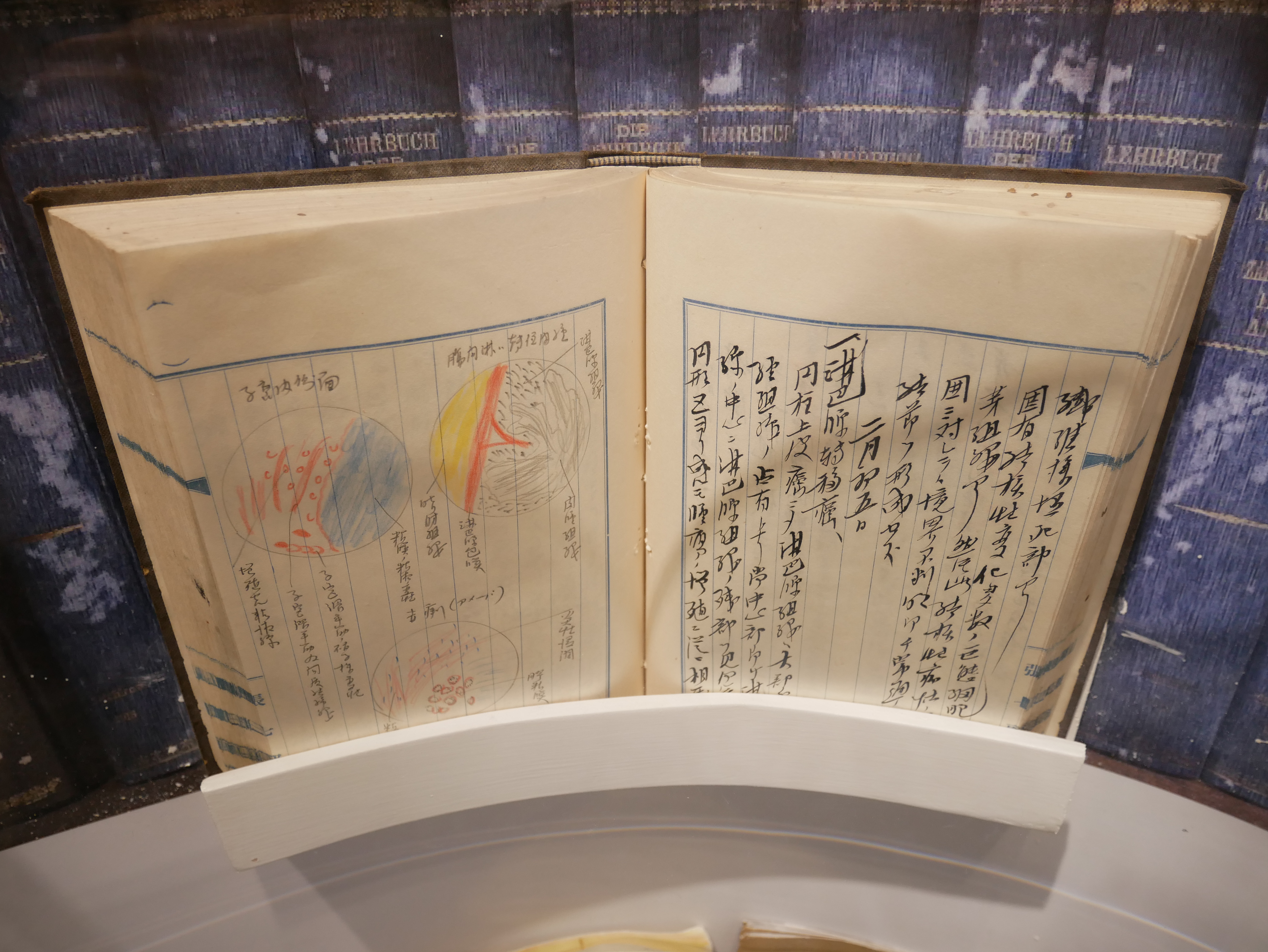 中文（台灣）: 張七郎就讀臺灣總督府醫學校時的筆記，臺北市中正區東門次分區東門里